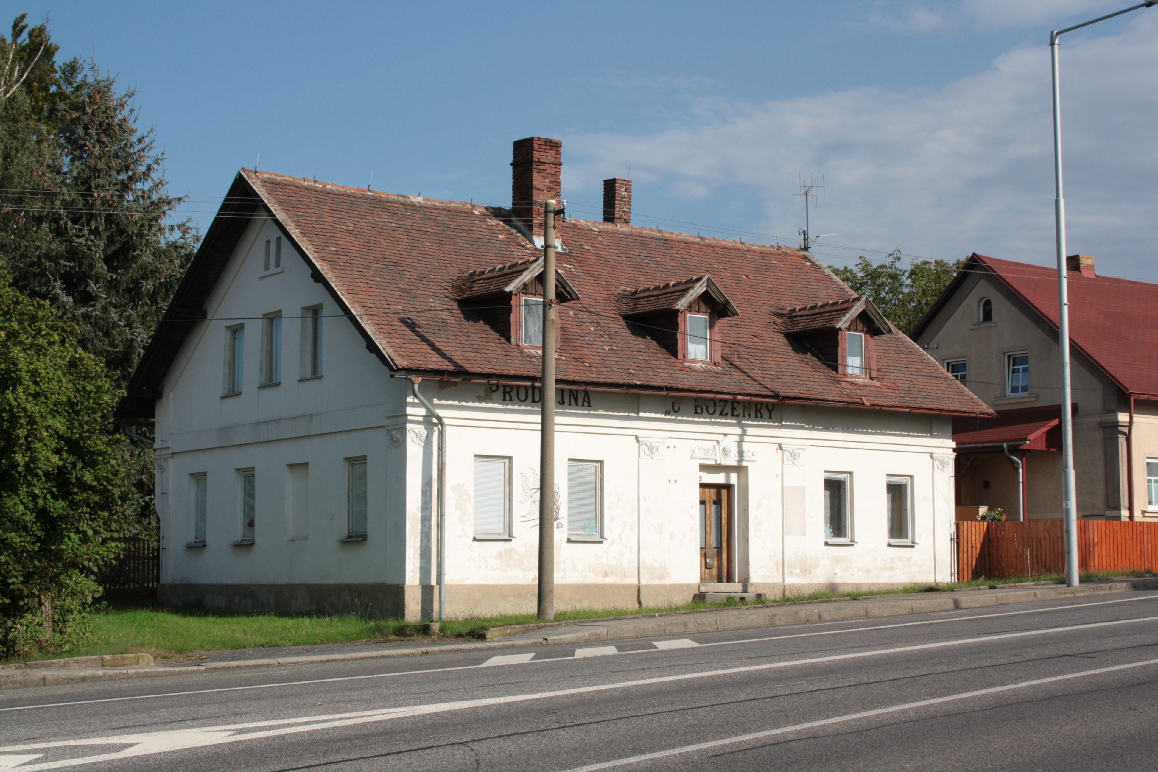 This photograph was taken with a DSLR from WMCZ's Camera grant. Dům evidenční číslo 158 v Habarticích v okrese Liberec (pohled ze severu).